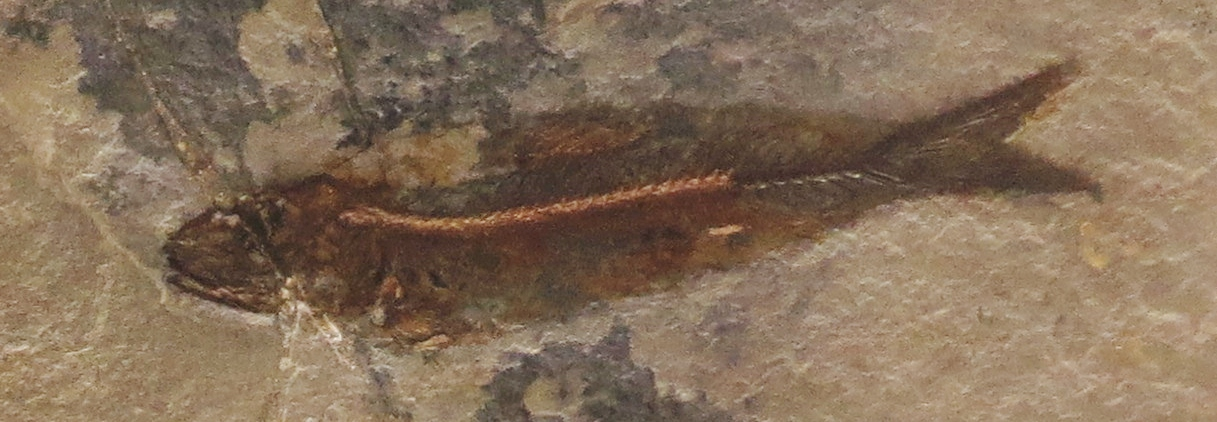 Fossil - Took the picture at Museo di storia naturale di Verona